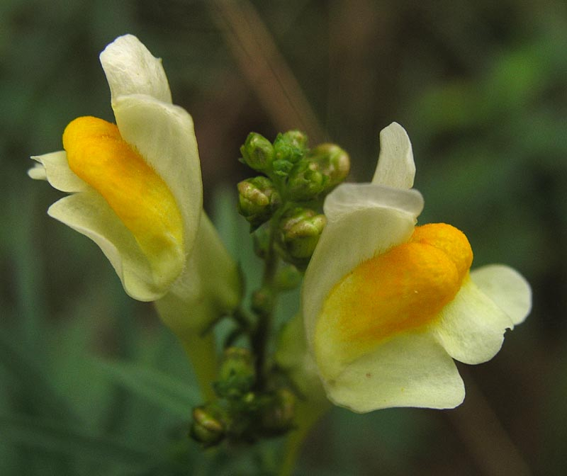 Echtes Leinkraut (linaria vulgaris), aufgenommen in Buseck